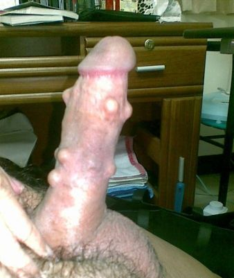 陰莖包皮底下植入珠子 使其增加摩擦表面積